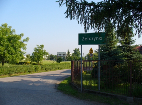 Wieś Zelczyna widziana od strony Krzęcina